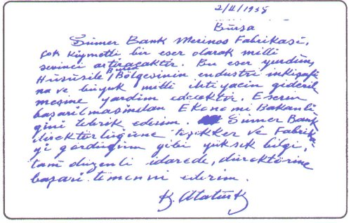 Mustafa Kemal Atatürk'ün Sümerbank hakkında el yazısı